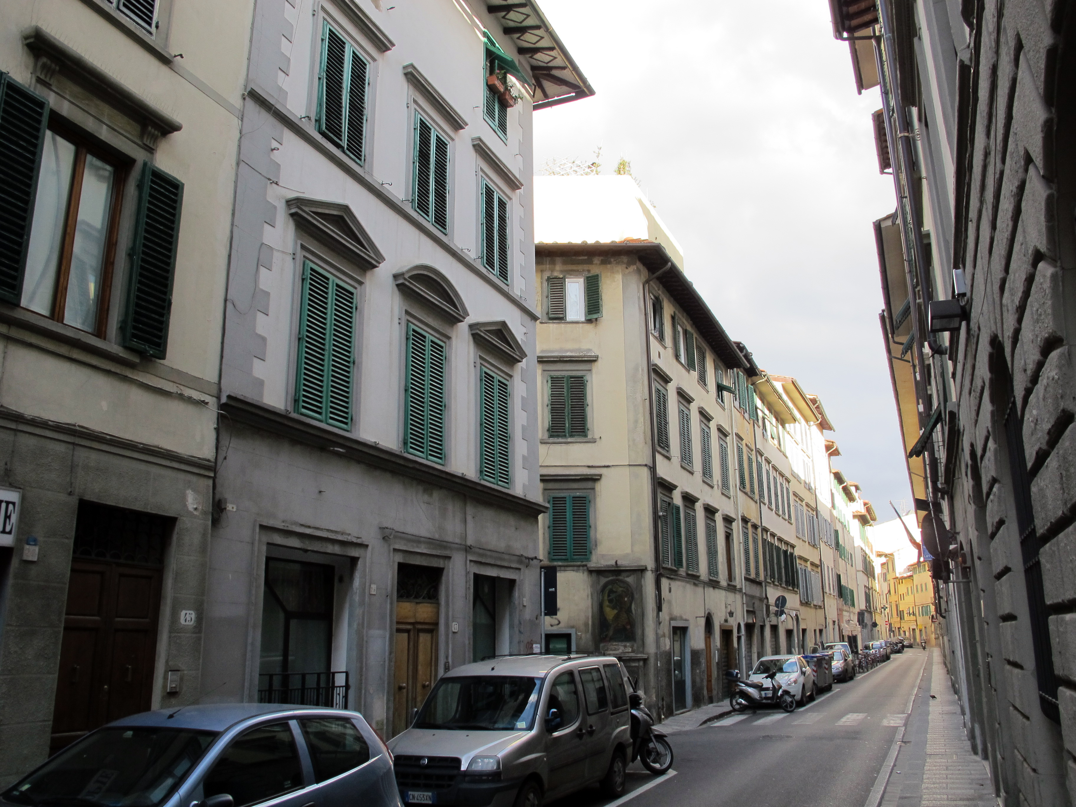 Via de' pilastri, veduta